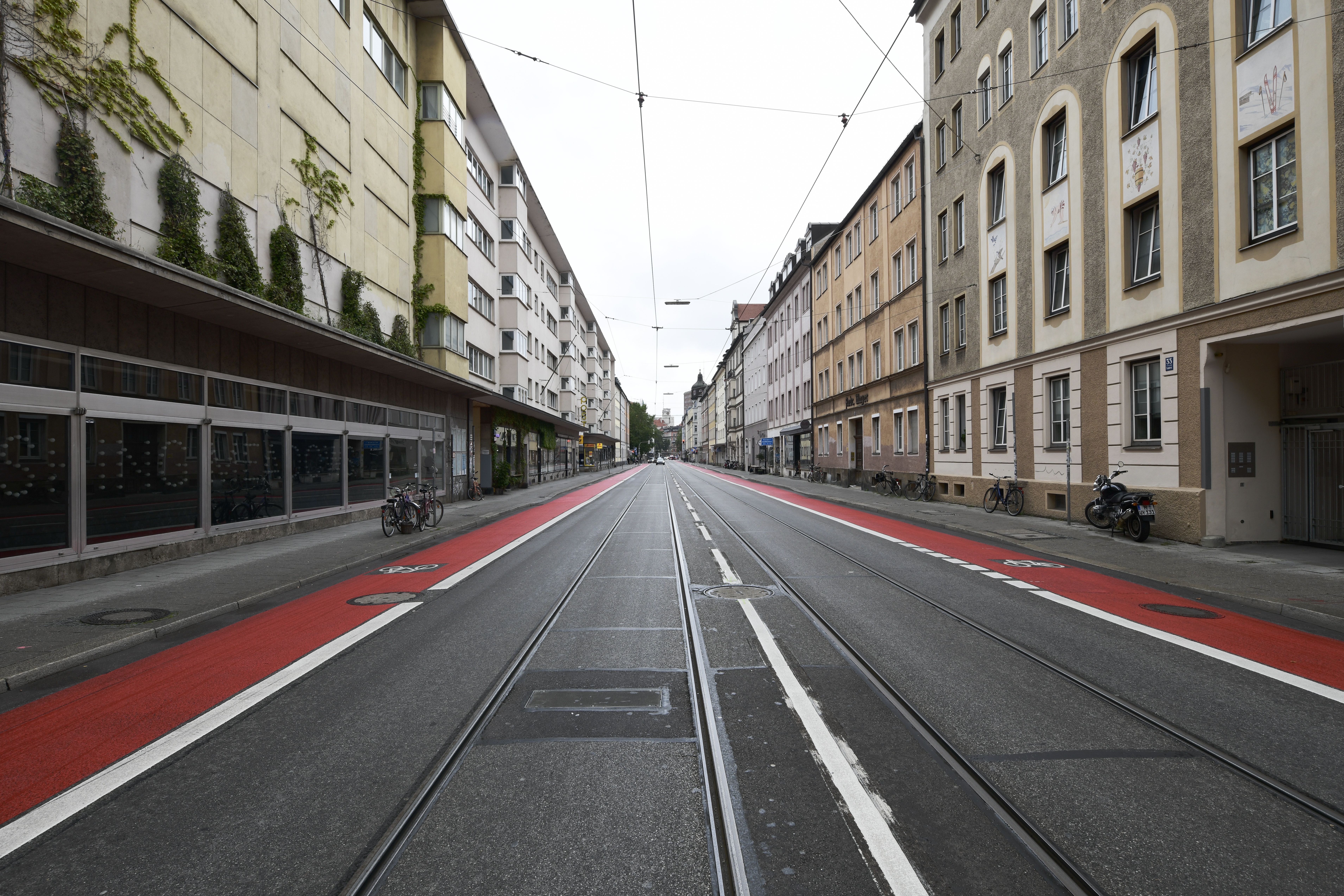 München. Blick nach Norden in die neue Fraunhoferstraße. Zustand September 2019.